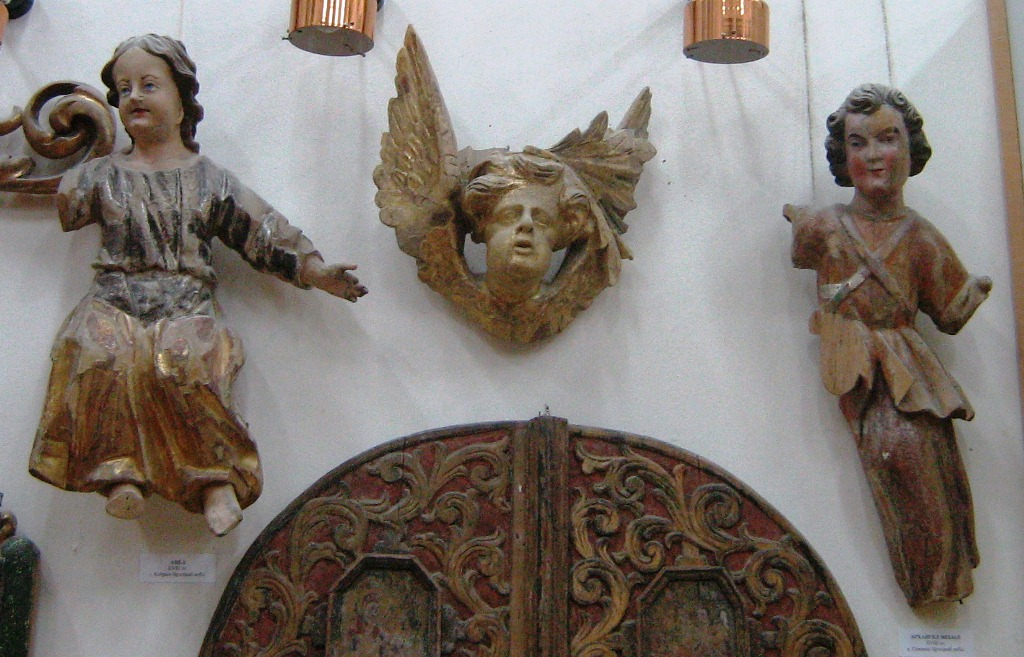 Old Belarusian History Museum Native nameМузей старажытнабеларускай культурыLocationMinsk, BelarusCoordinates53° 55′ 00″ N, 27° 36′ 10″ E Established1977Website control : Q6511262